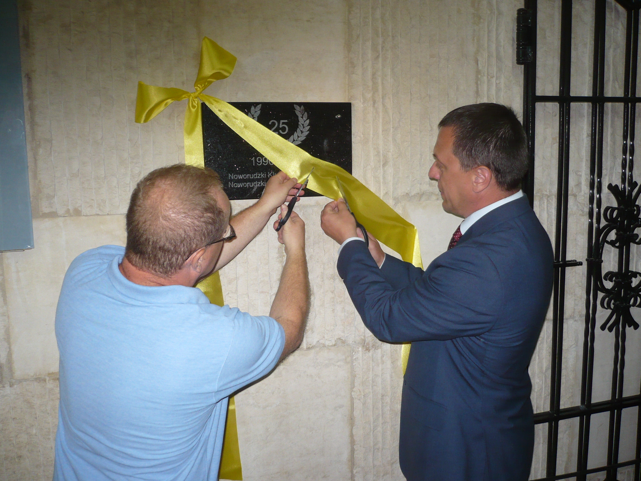 XXV Noworudzkie Spotkania z Poezją